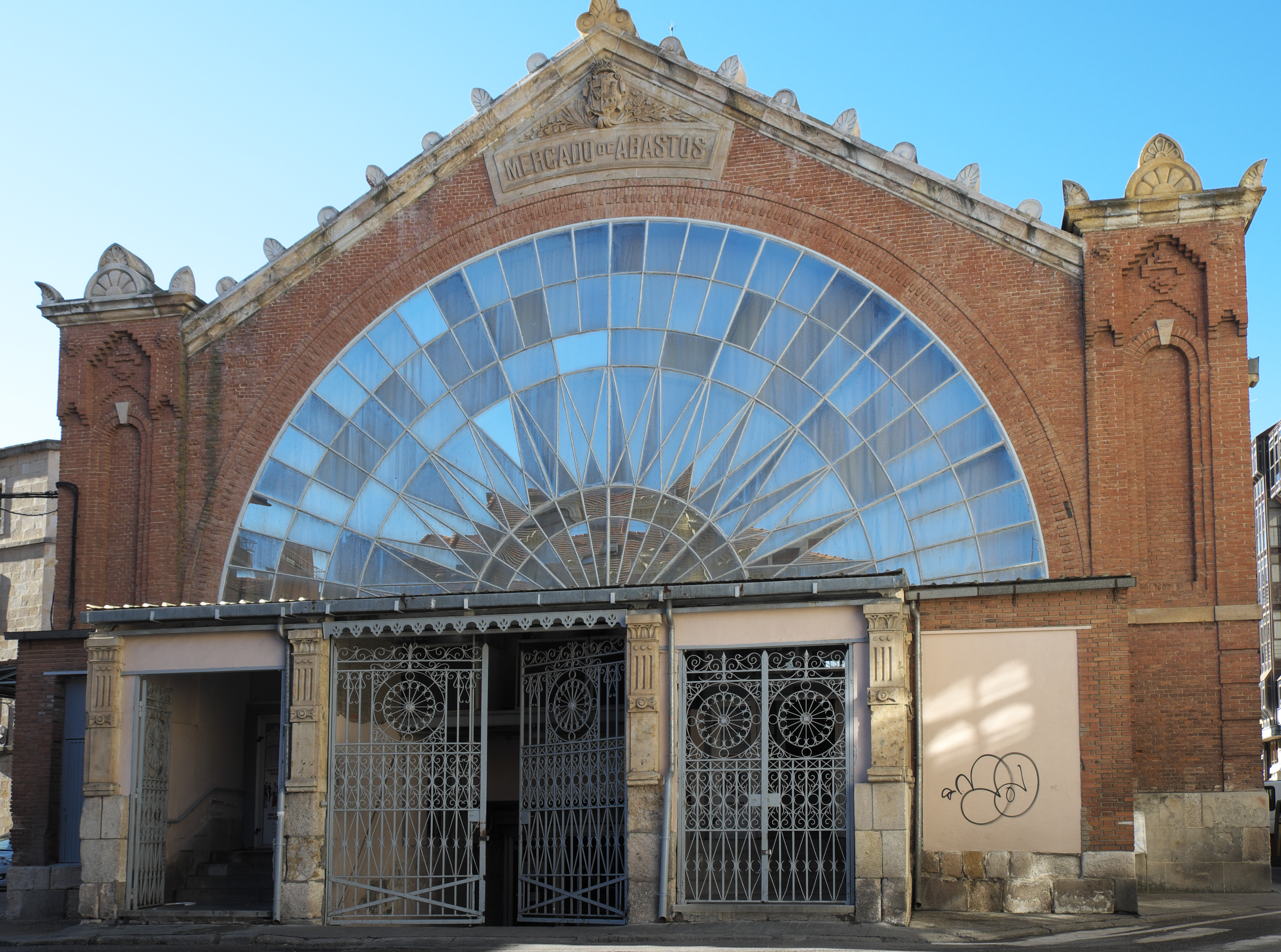 Mercado de Abastos (Markthalle) in Zamora (Kastilien-León/Spanien)